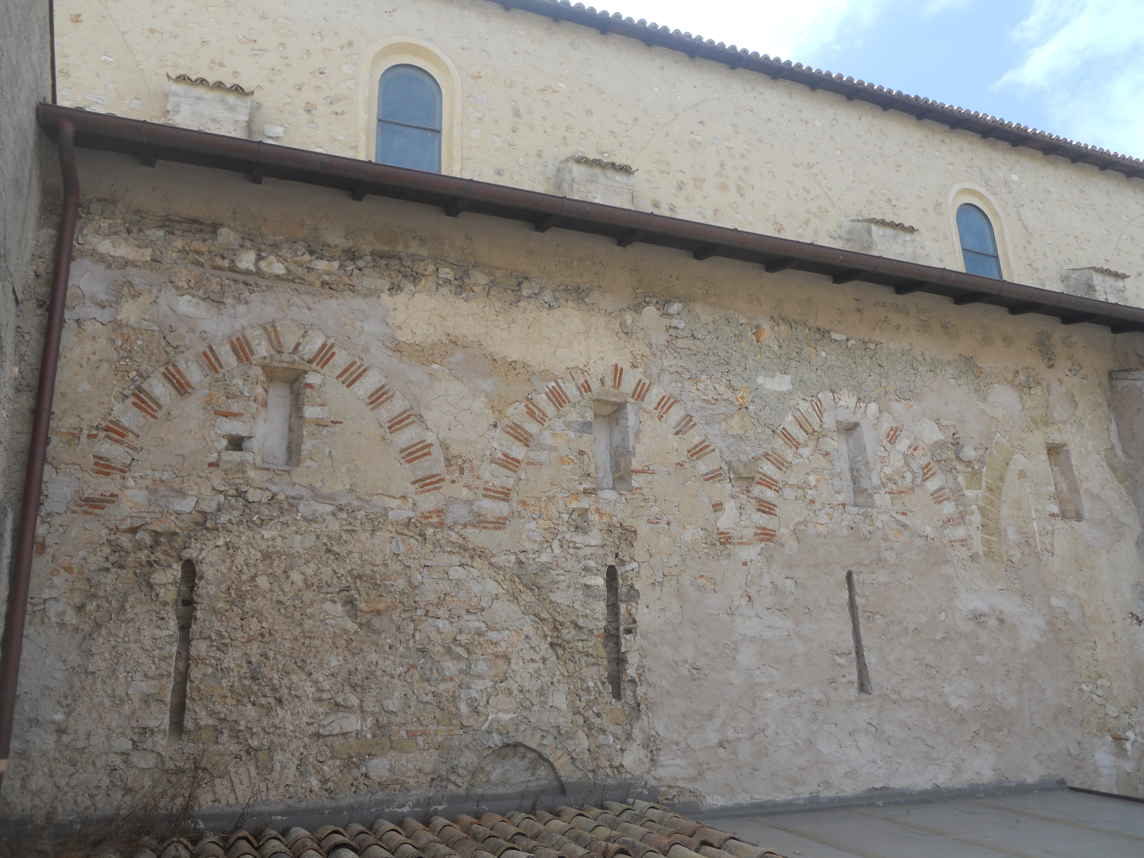 La fiancata destra della chiesa di Sant'Erasmo in Formia, con visibili le tracce gotiche dell'edificio.